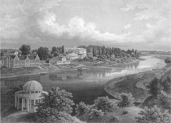 Mesothen in Kurland. Stahlstich, 13x18 cm